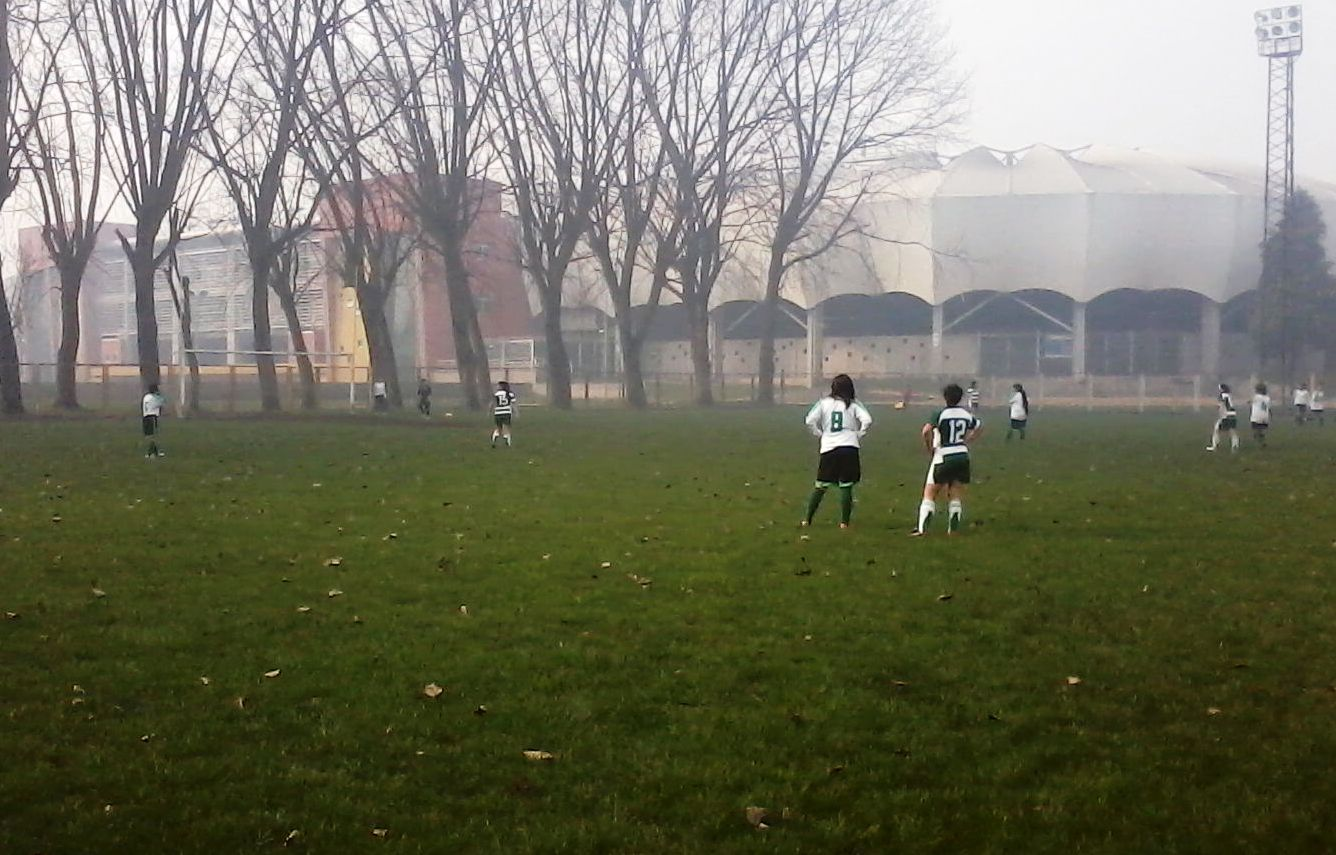 partido entre dep Temuco femino y Puerto Montt (categoría adulta)